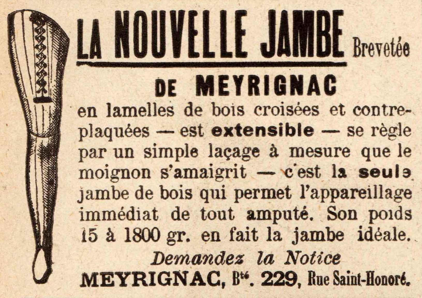 Scan of L'ILLUSTRATION 9 Ferviers 1918 Annonces page 2 La nouvelle jambe